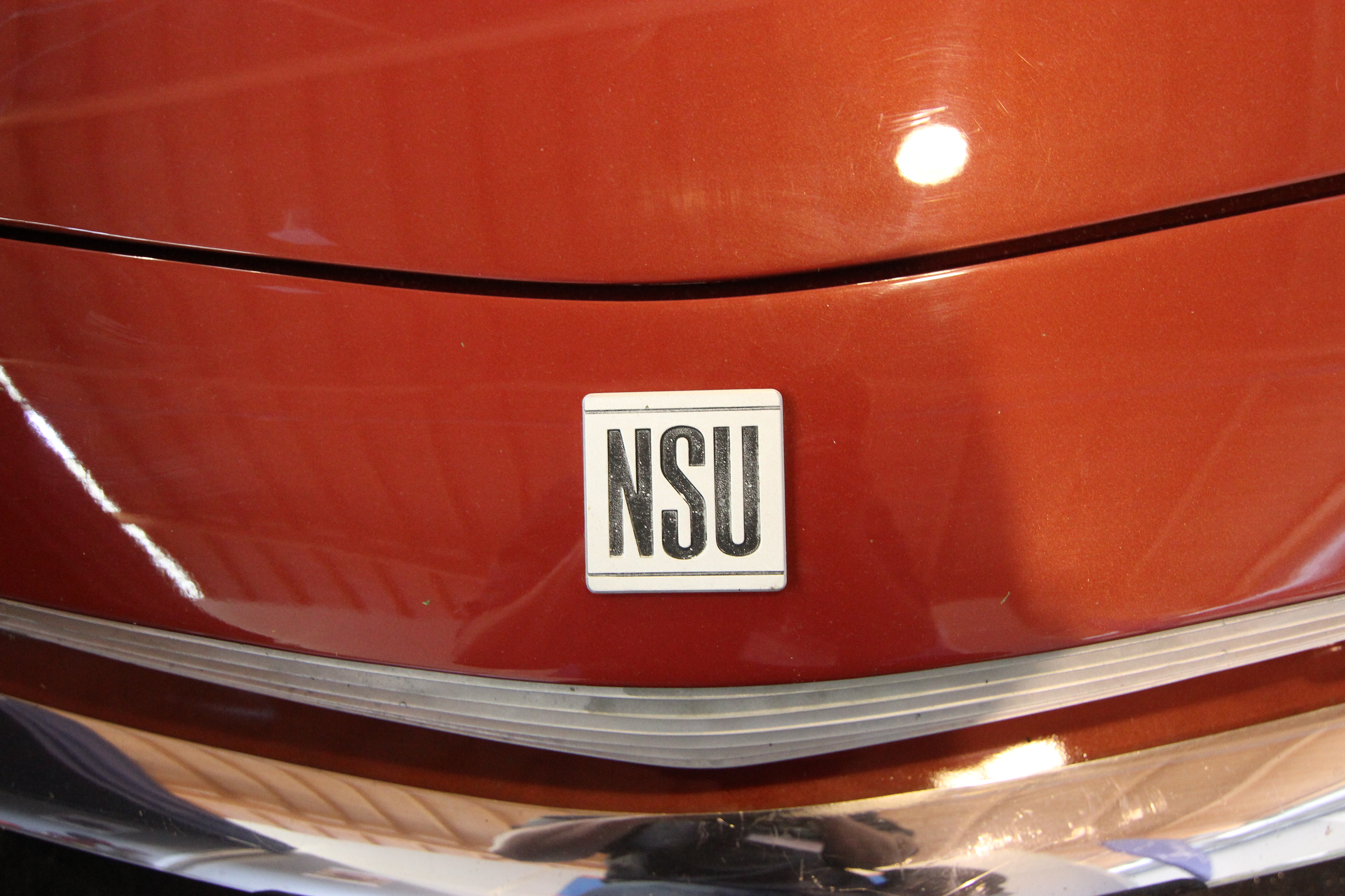 NSU Ro80 - auf der Klassikwelt Bodensee Friedrichshafen